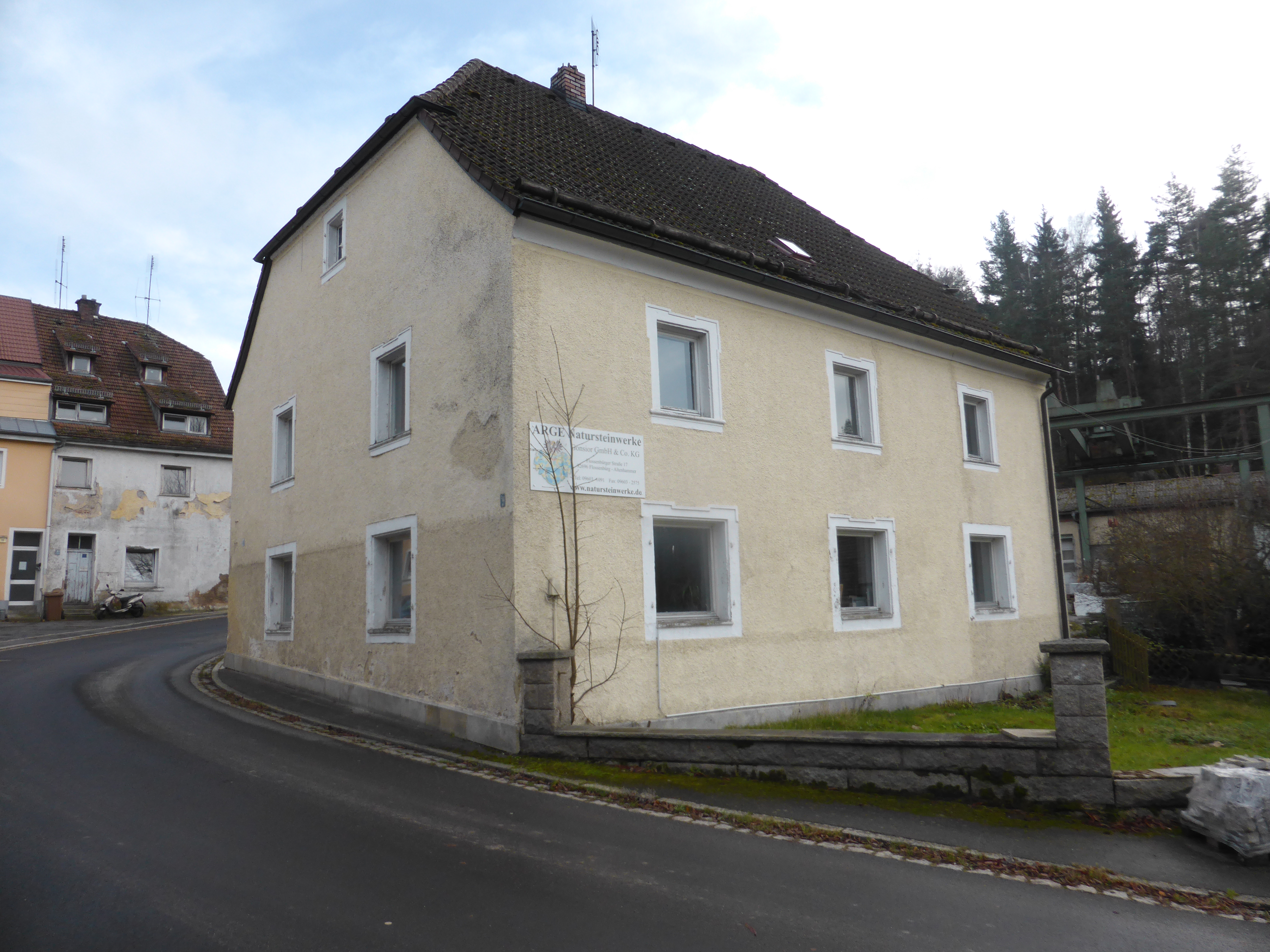 Altenhammer - Schlößl (Flossenbürg)